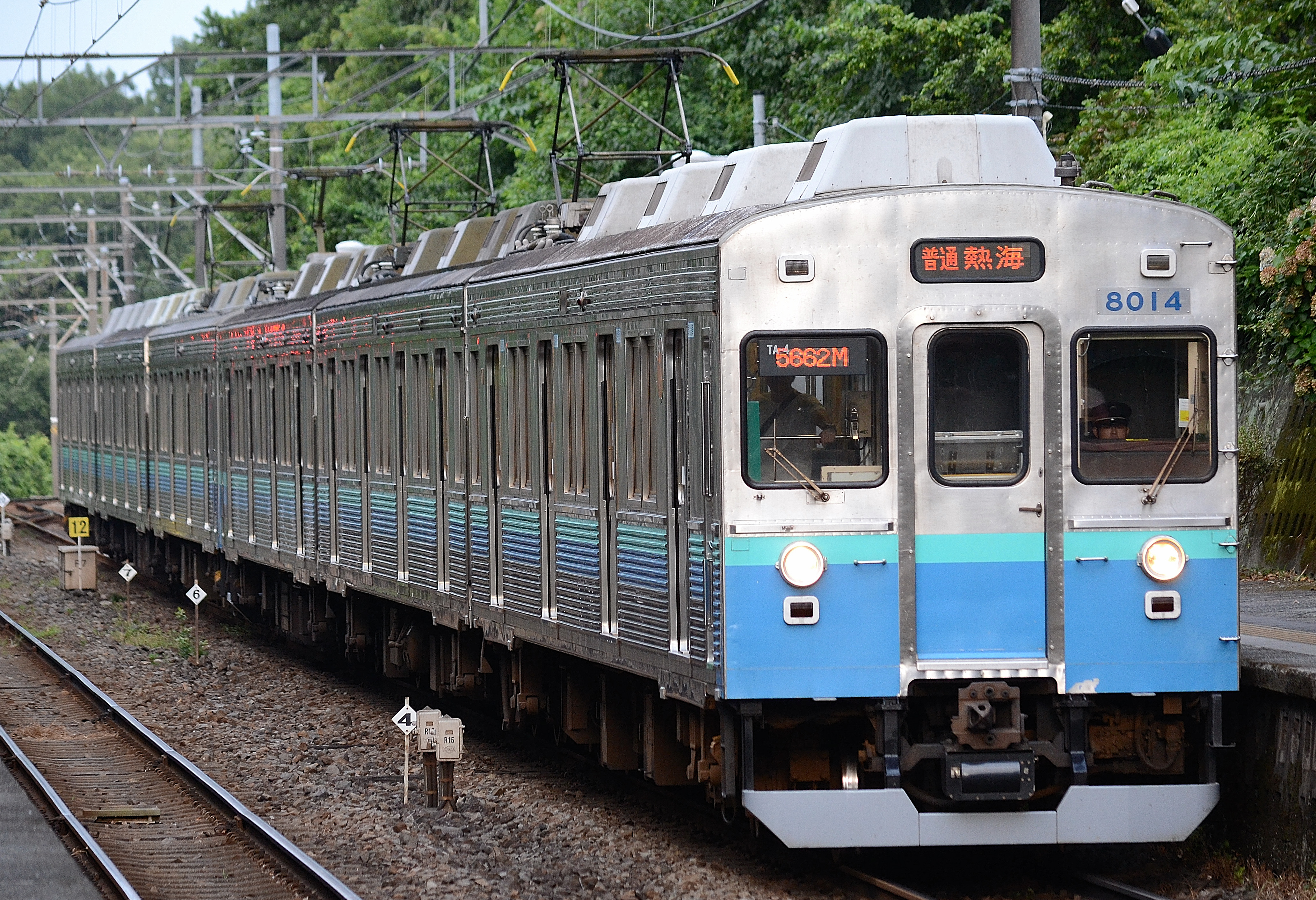 伊豆急行線 川奈駅に到着する伊豆急行8000系電車